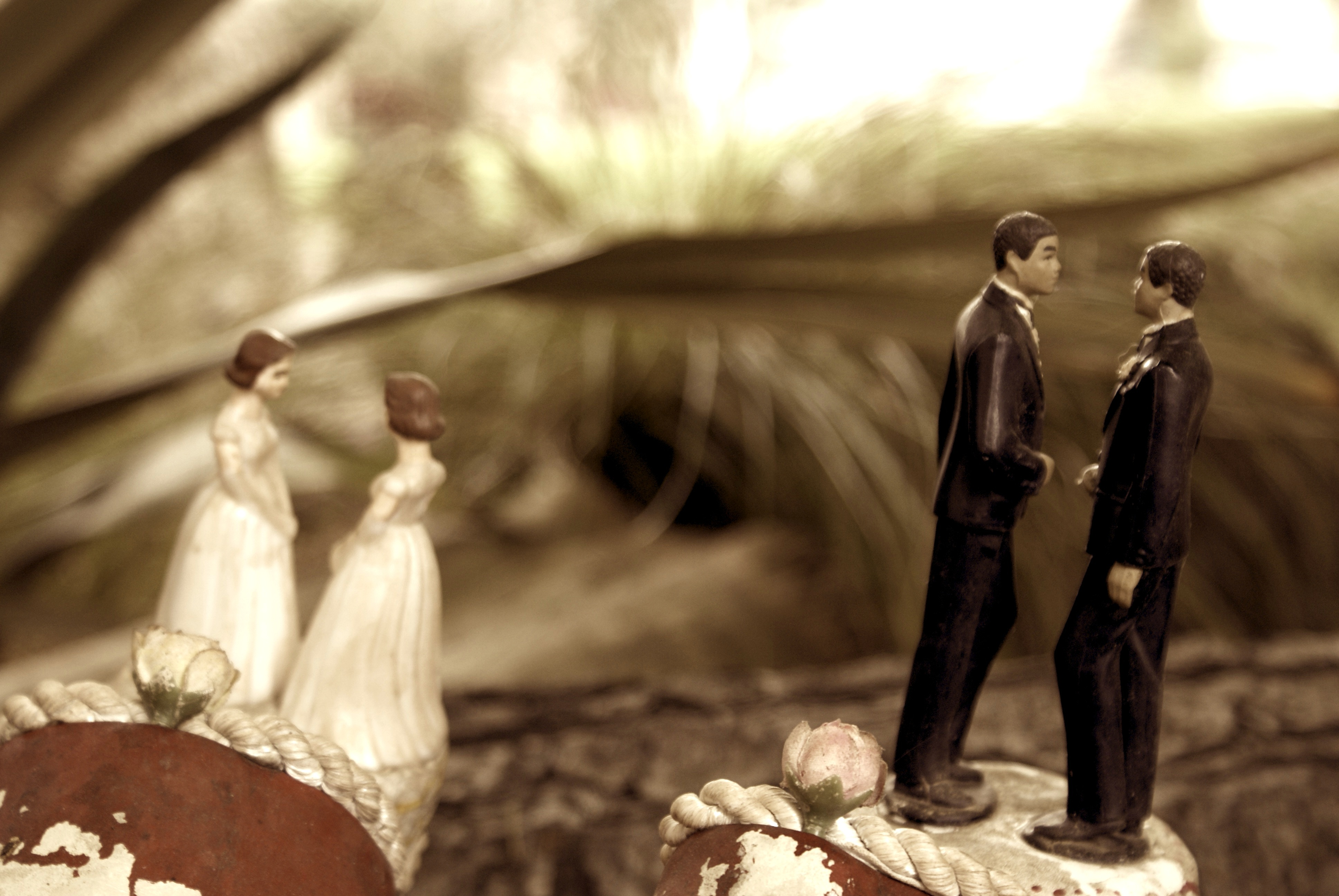 art to support same-sex marriage, Alamo Square, San Francisco, 2007